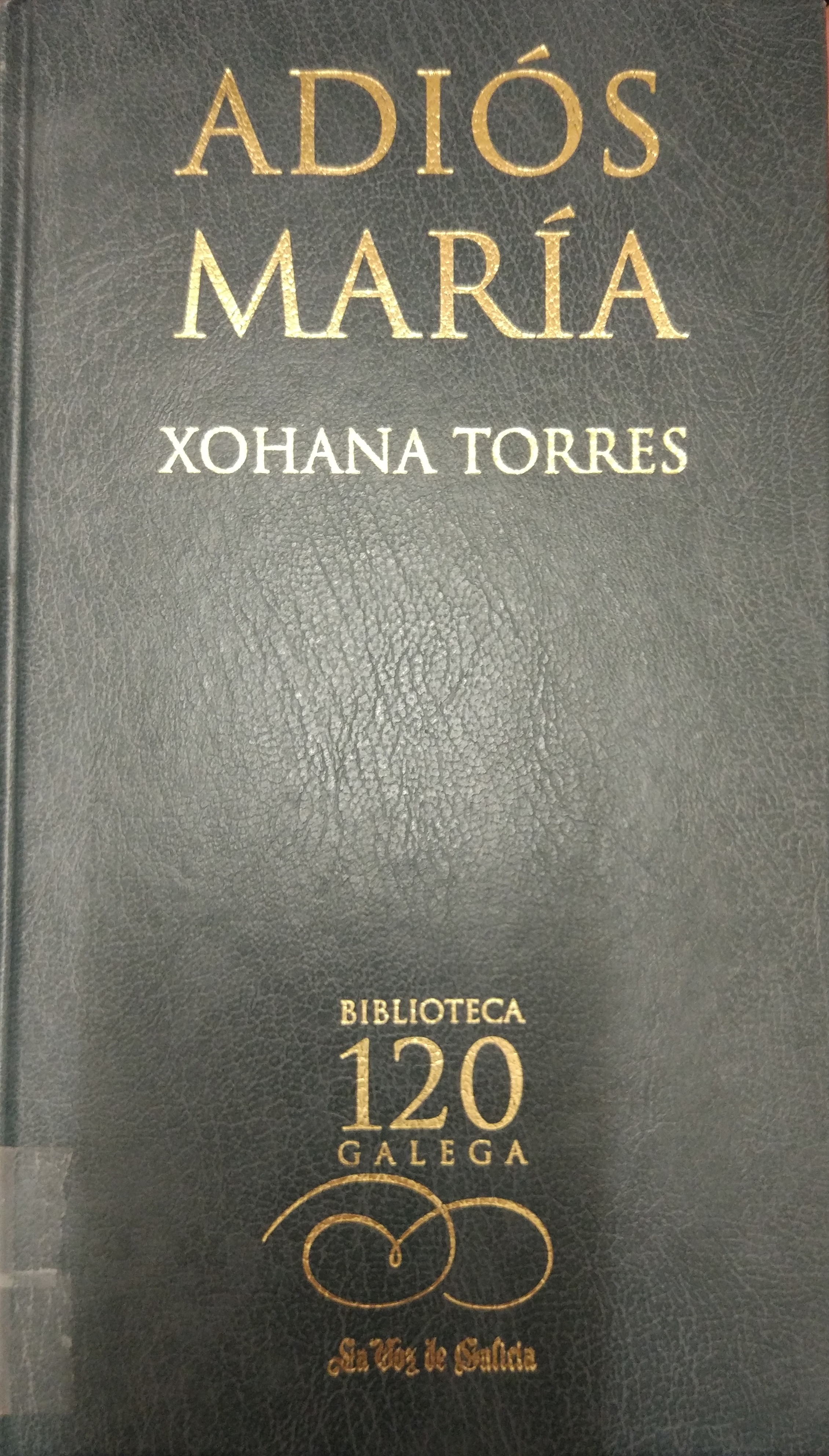 Capa do libro de Xohana Torres: "Adiós, María"